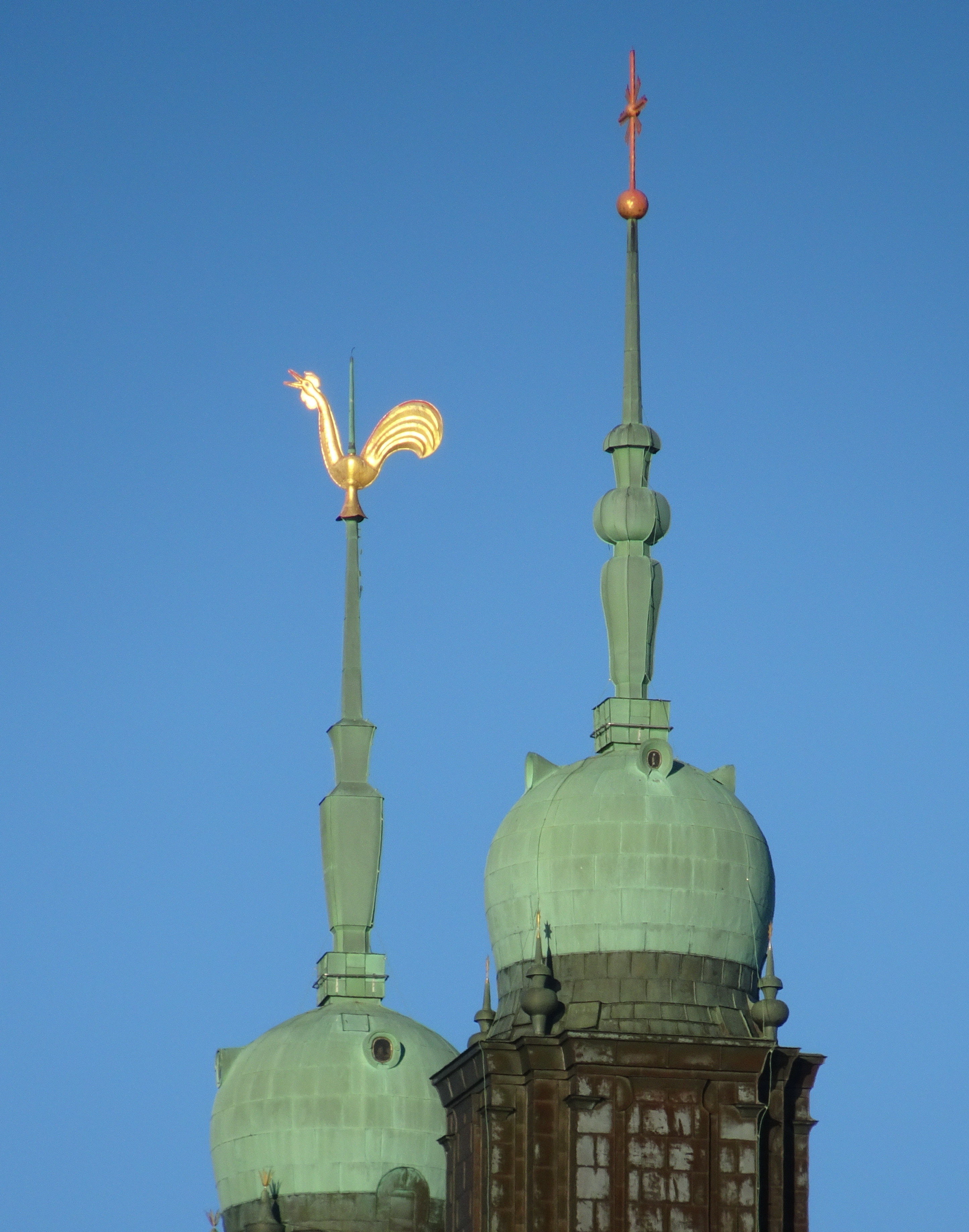 Högalidskyrkan, tuppen och spiran